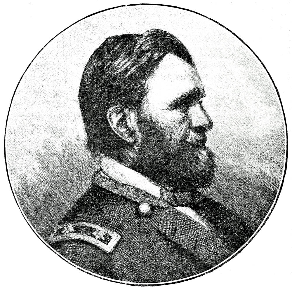 Это изо было использовано в статье «Грант, Улисс Симпсон» опубликованной в восьмом томе «Военной энциклопедии», который был издан книгоиздательским товариществом И. Д. Сытина в 1912 году в столице Российской империи городе Санкт-Петербурге.